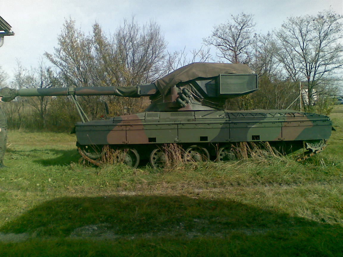 Jagdpanzer "Kürassier" des österreichischen Bundesheeres mit Regenschutzabdeckung.